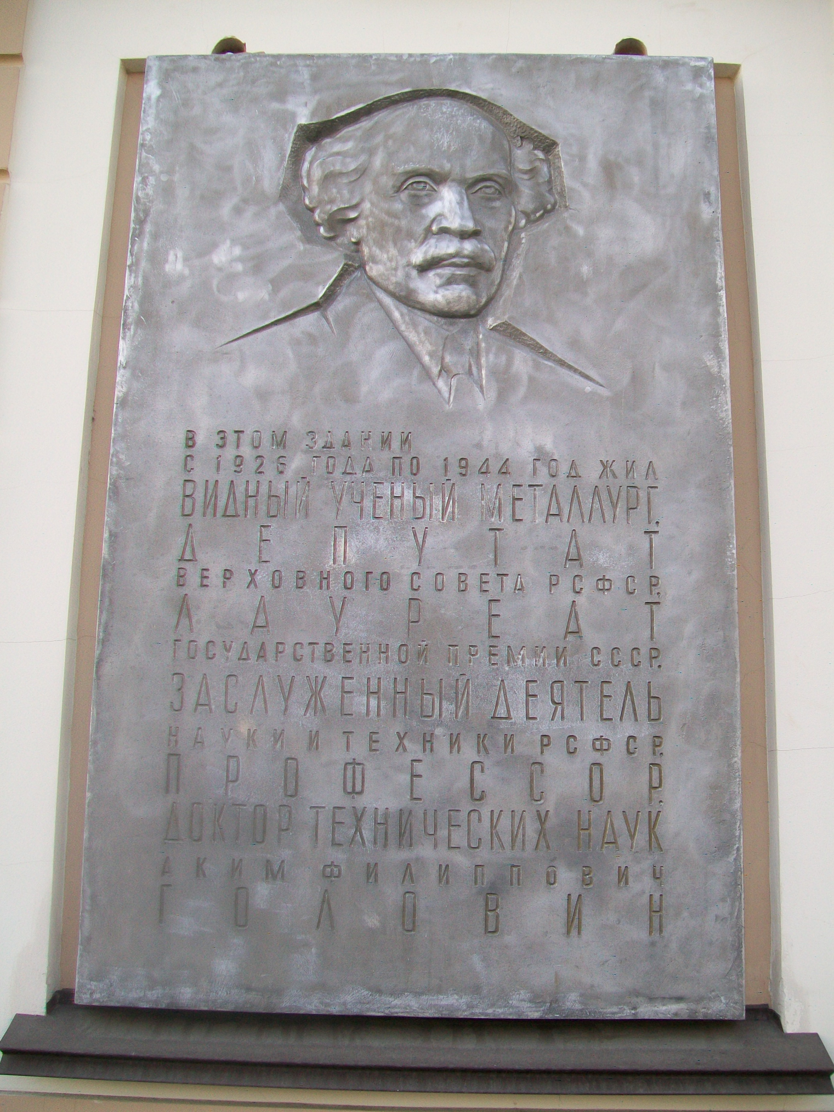 Мемориальная доска Акима Головина в Екатеринбурге на доме, где он жил (улица 8 марта, 68)